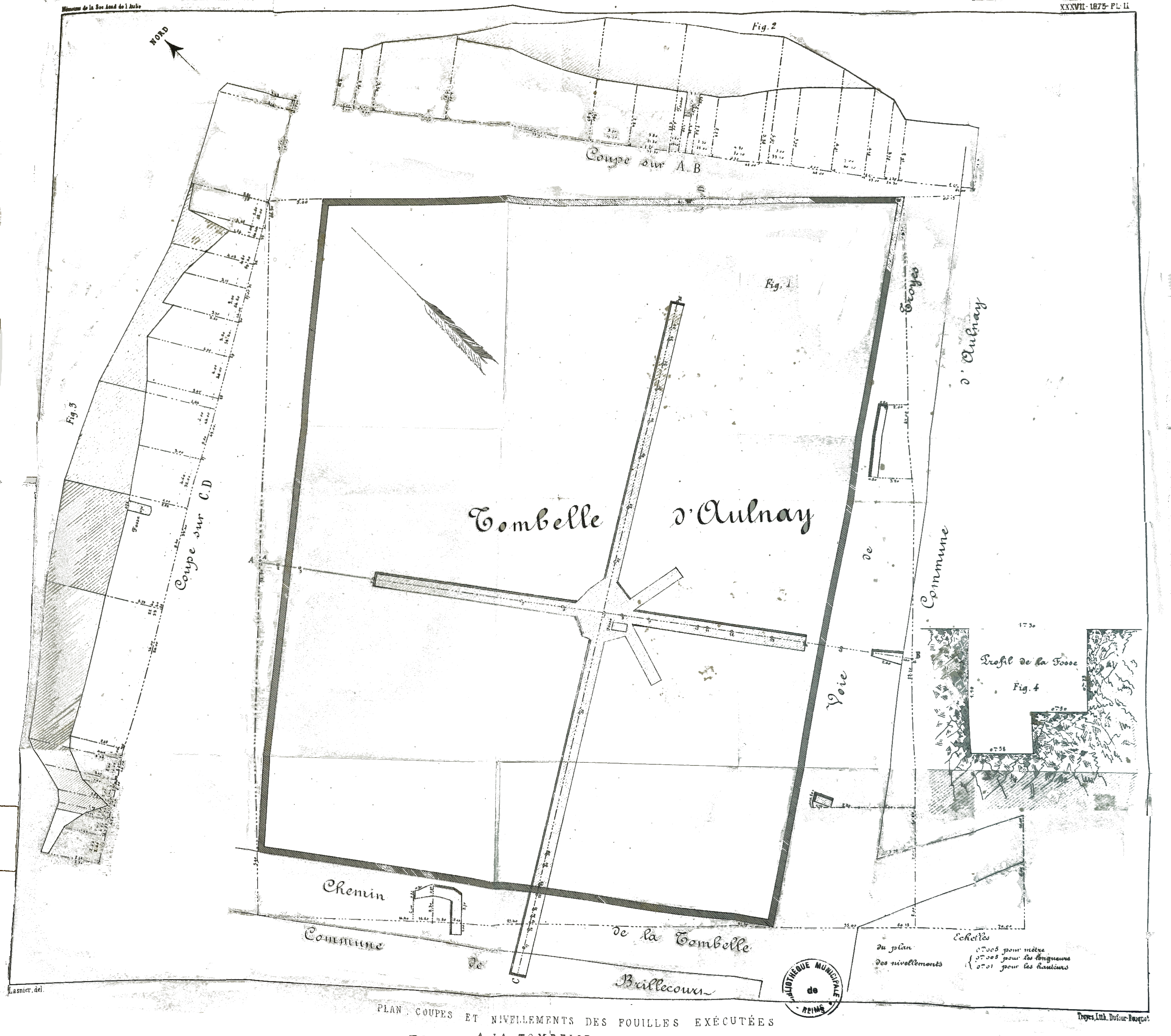 dessin de la tombe